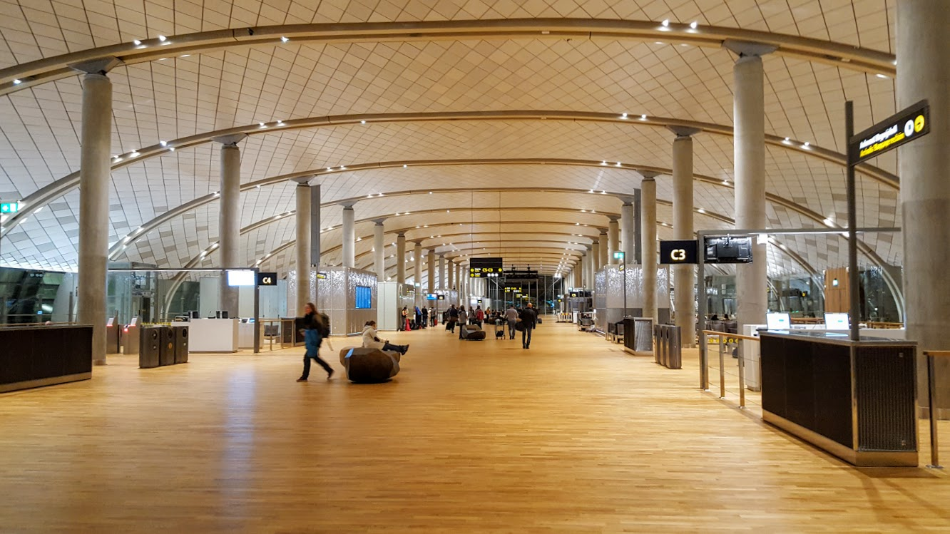 Den nye nord-piren ved Oslo Lufthavn.